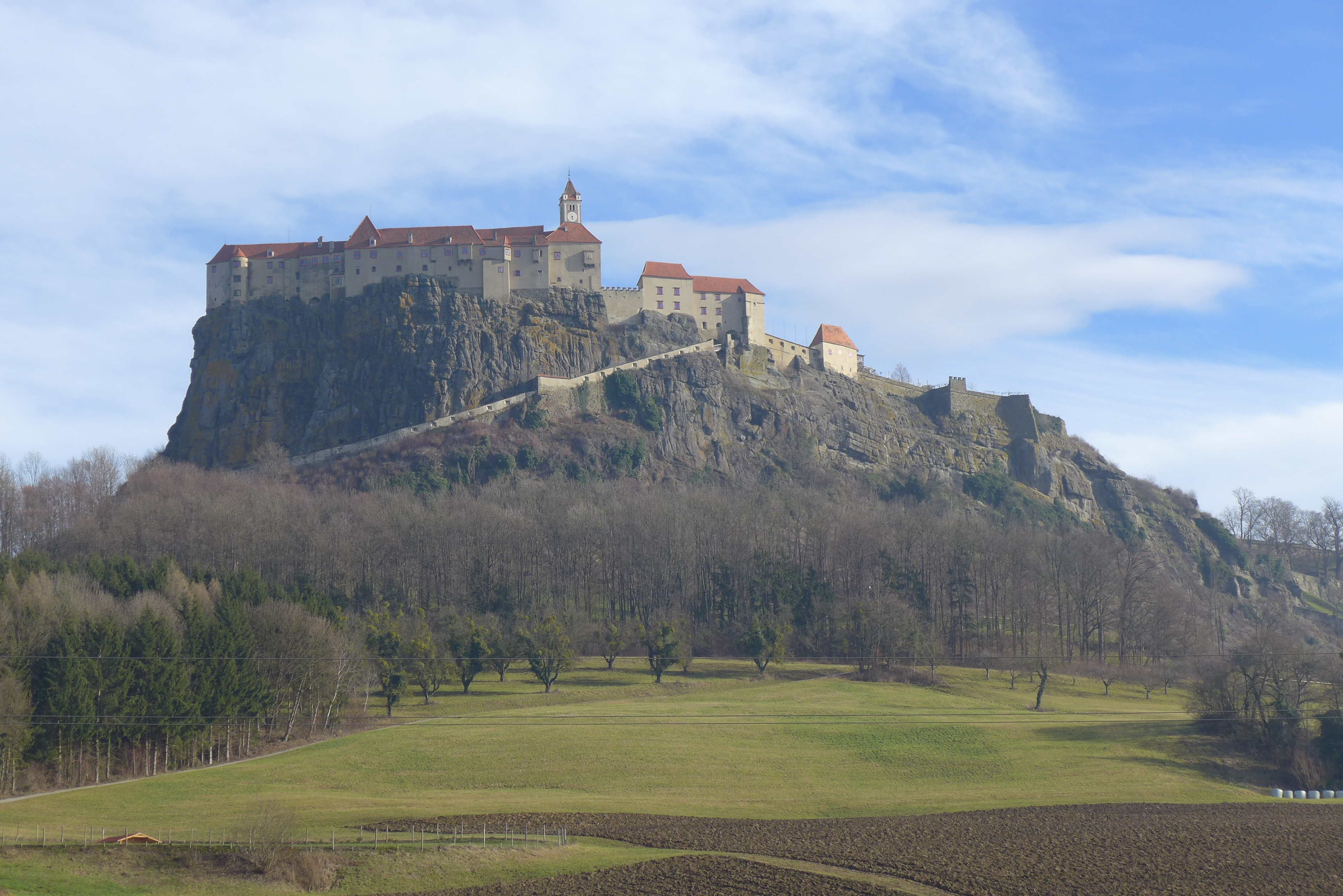 Die Riegersburg von Süden 1